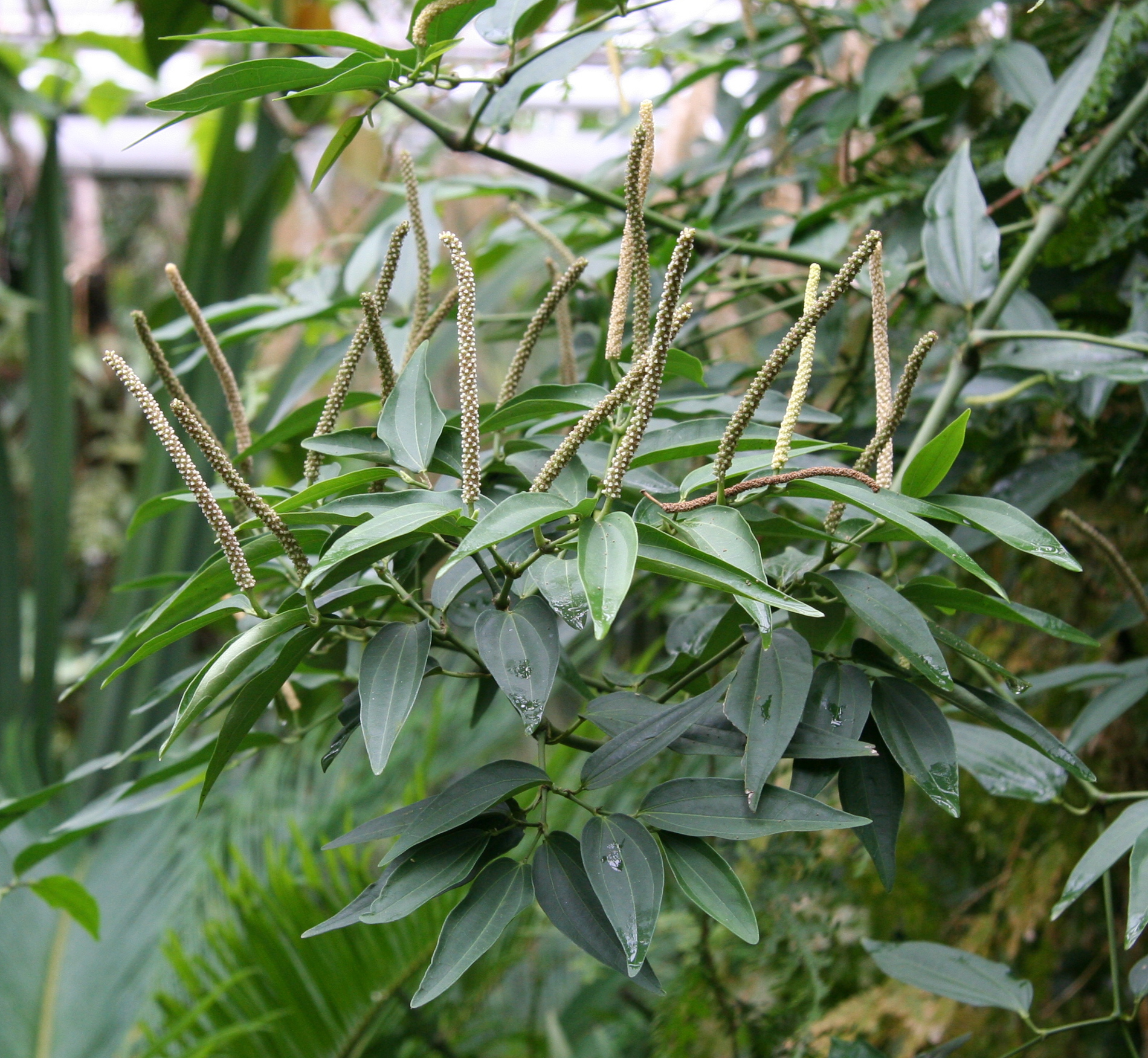 Piper cubeba im Botanischen Garten Dresden